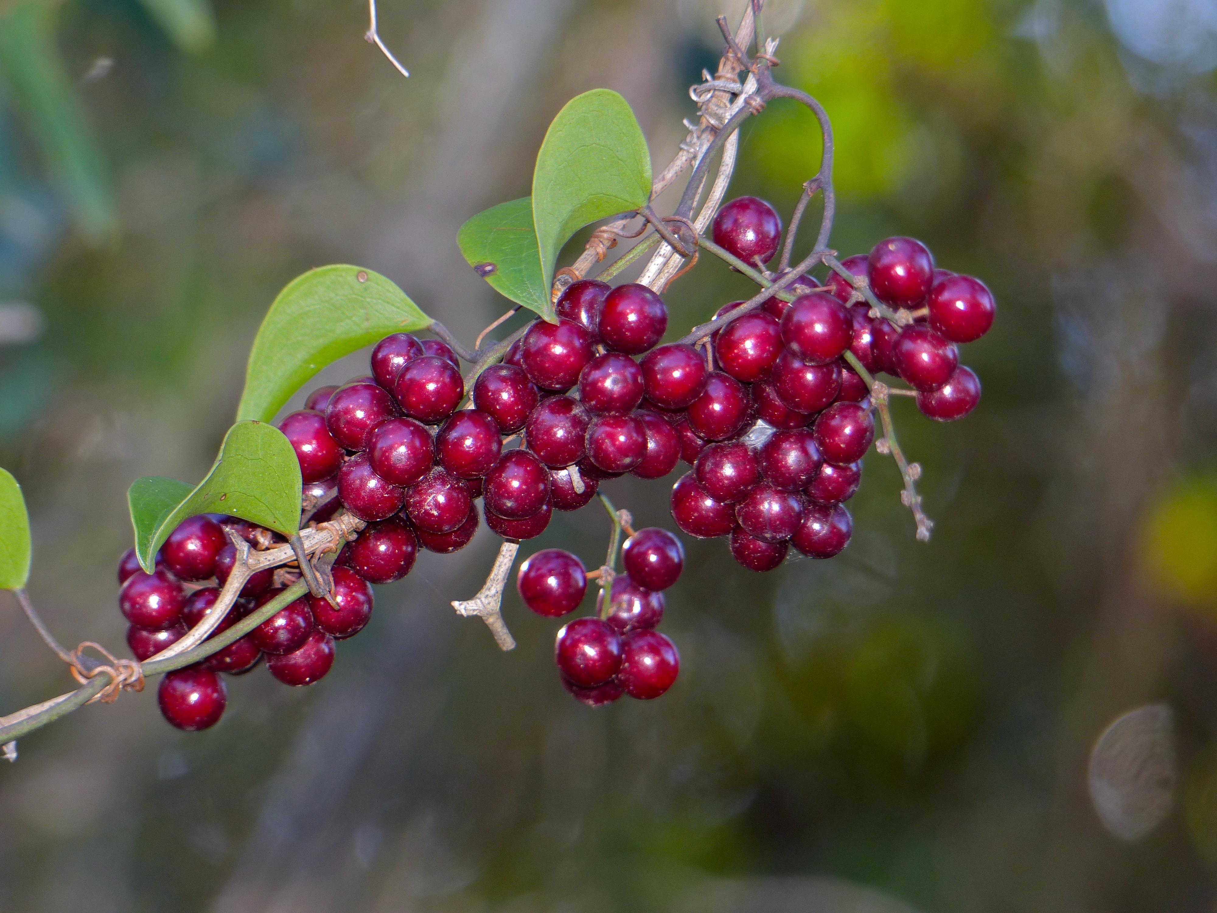 Valcrose, Aniane, Hérault, FRANCE